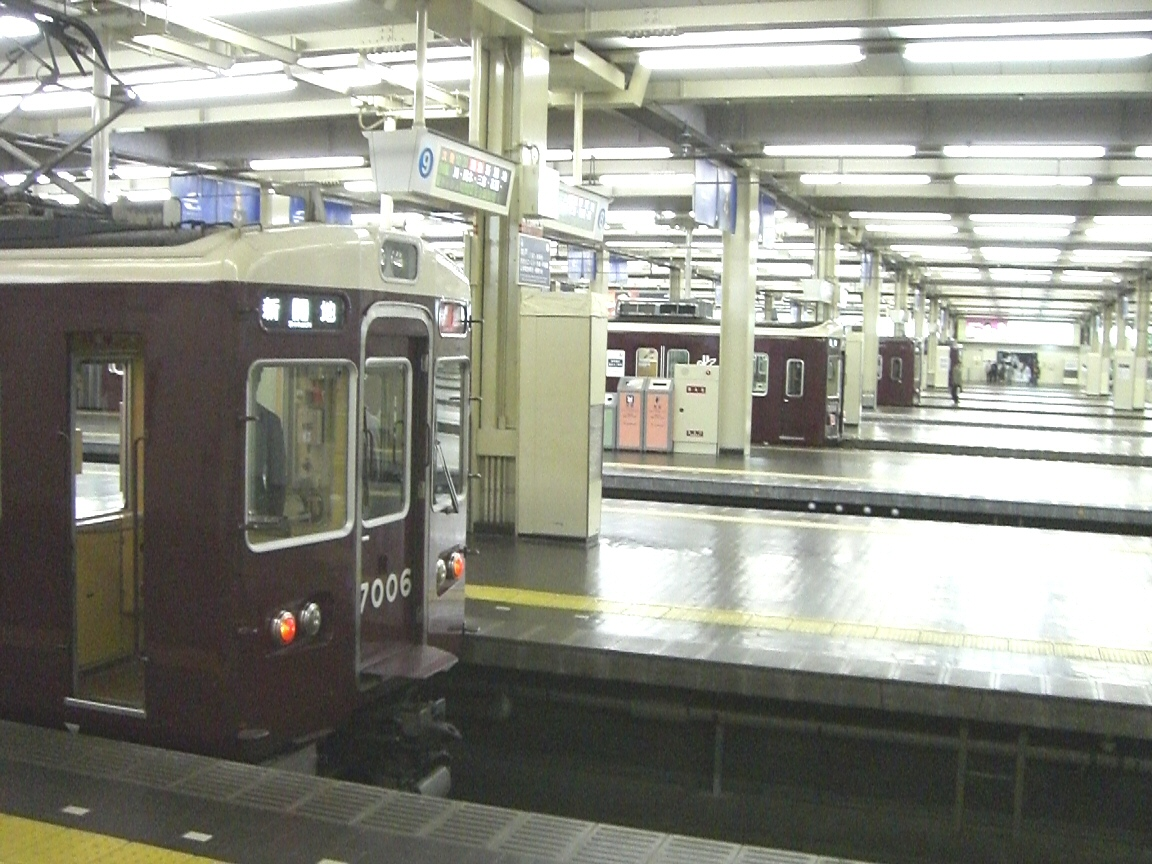 Hankyu Umeda Station; 阪急電鉄ja:梅田駅の風景